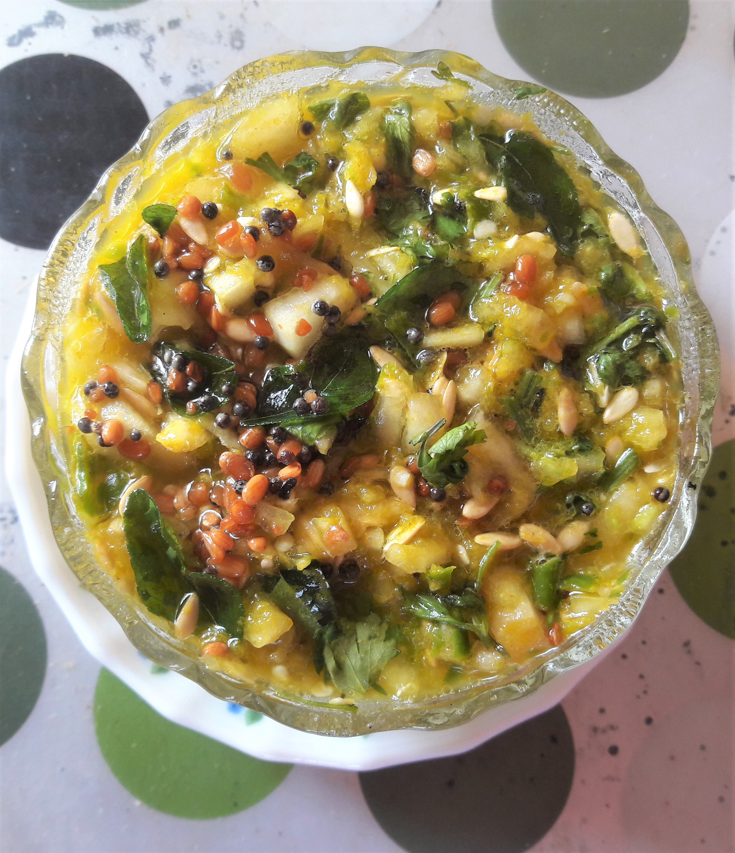 దోసకాయ పచ్చడి